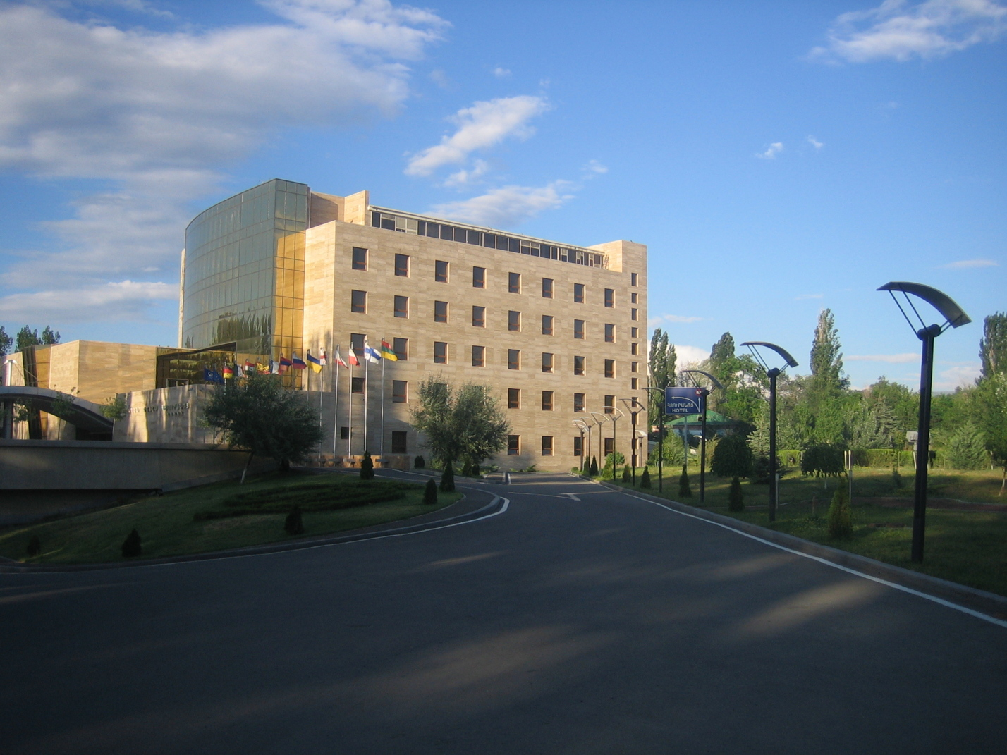 Golden Palace Hotel